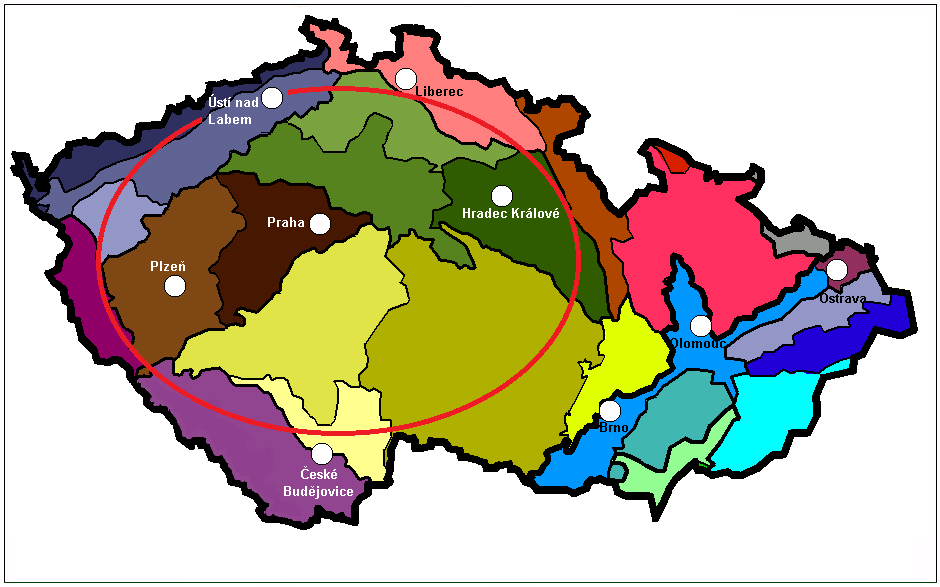 Šumava